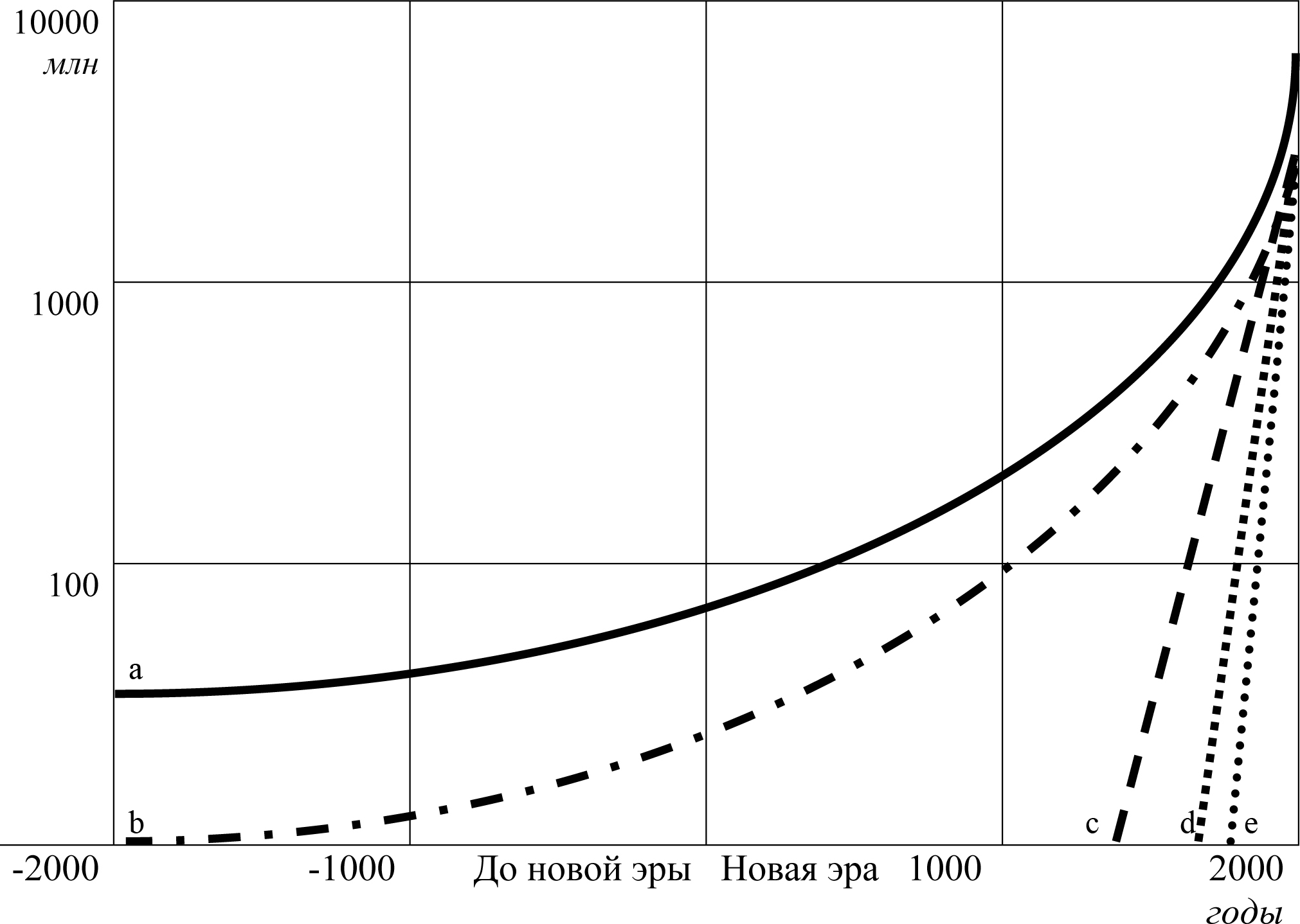 Распространение в популяции H.sapiens новых функционально-поведенческих отличительных признаков в виде полезных интеллектуальных навыков взаимодействия a - население Земли 7 млрд; b - грамотность; c - чтение-печатание - доступность всем грамотным; d - получение радио-, телевизионной информации (кол-во приемников); e - информационная связь через телефоны, компьютеры, интернет (кол-во телефонов, компьютеров, пользователей Интернет). (Еремин А.Л., 2005)